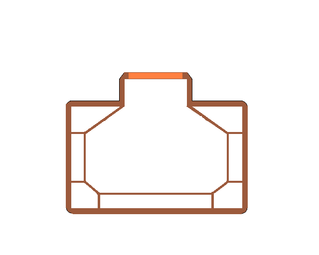 Querschnitt durch ein Öl-Schüttgutschiff (Oil-Bulk-Ore-Carrier)